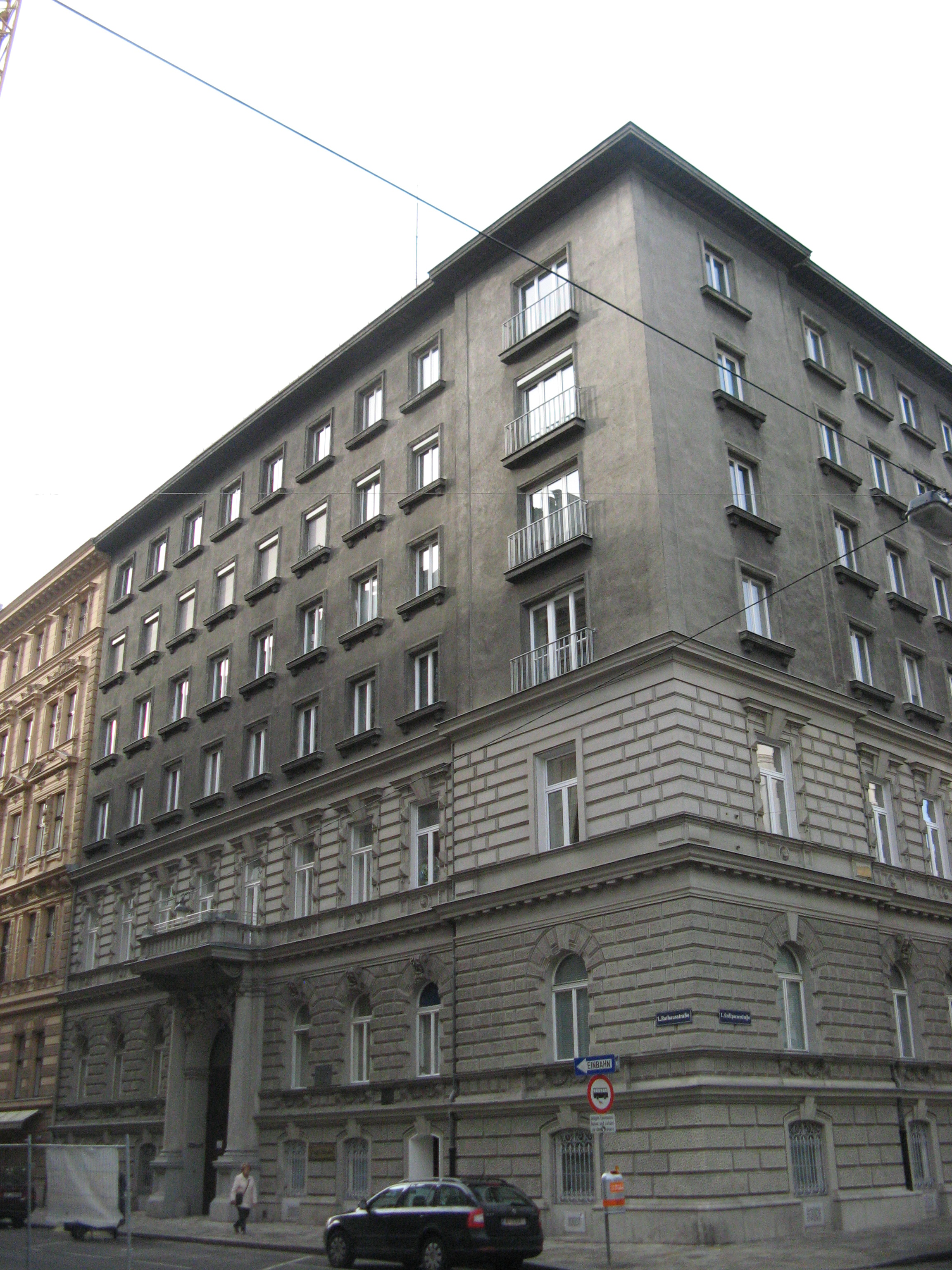 Haus Rathausstraße 13 (1881-82) von Wilhelm Stiassny, Wien-Innere Stadt